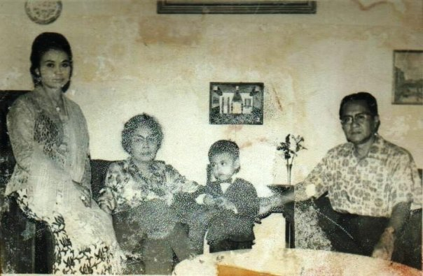 Kang Ari Tea ketika masih kecil sama Mamih Yati, Nin NR. Dewi Rukasah (cucu Pangeran Sugih) dan Aki R.T. Male Wiranatakusumah